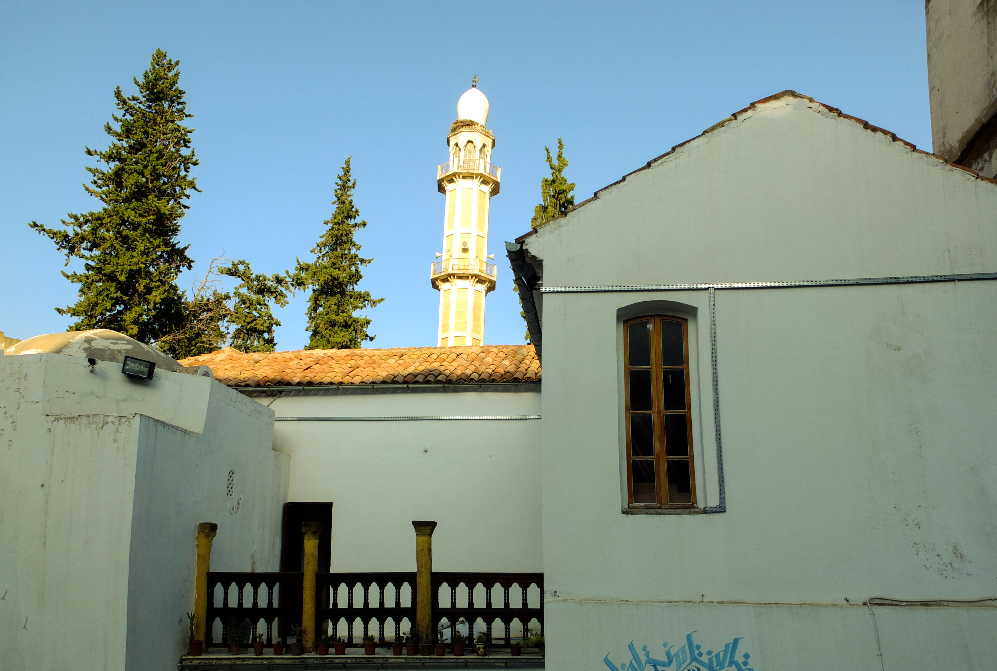 Dar El Bey dénommée Dar EL Emir Abdelkader Mon.Commemor./Mod (Médéa)